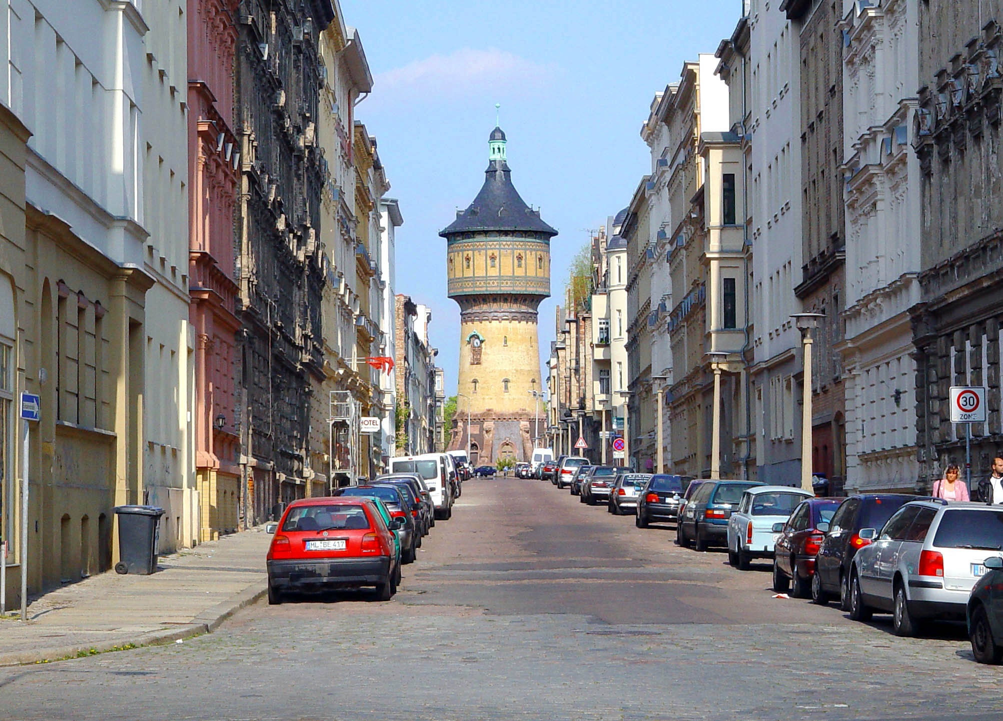 Beschreibung: A water tower in Halle , view from the Lessingstraße, Germany Aufnahmedatum: 23. April 2005 Fotograf: ArtMechanic